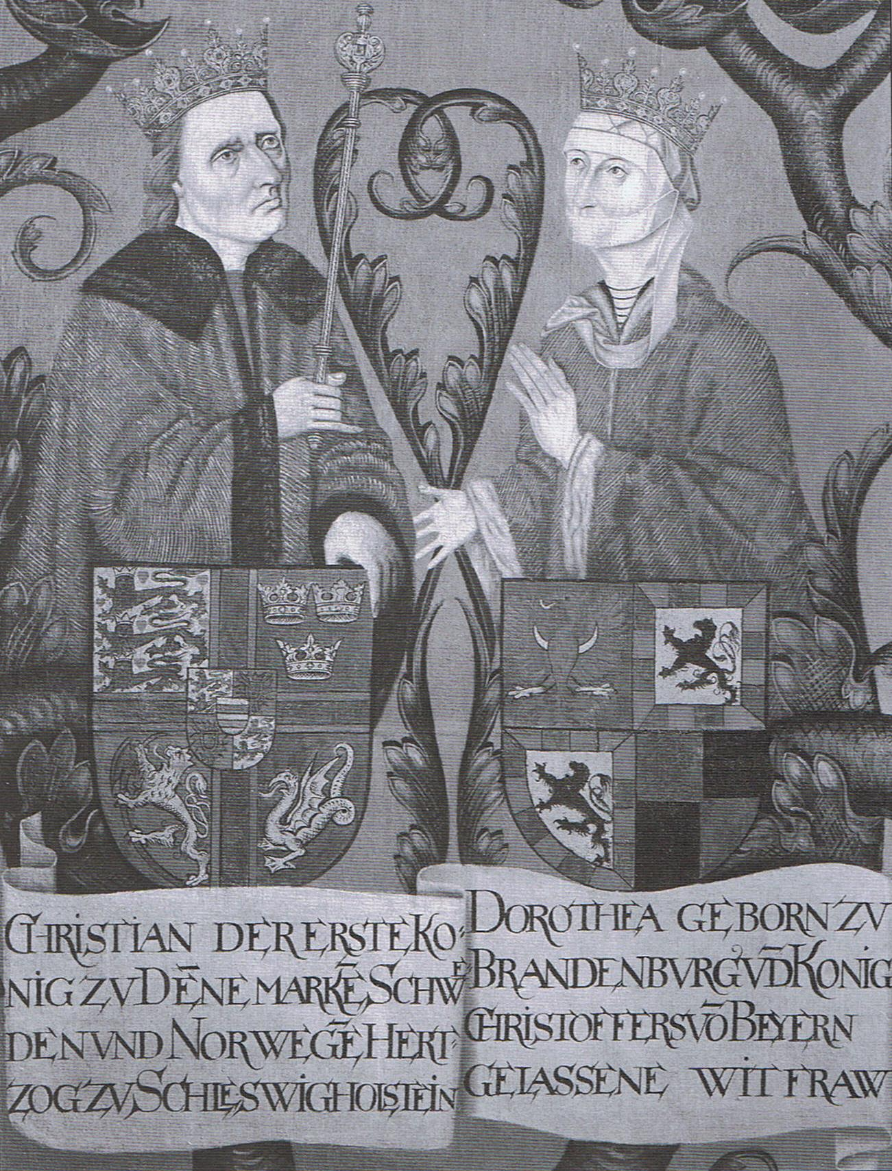 Король Дании Христиан I Ольденбург и его супруга, королева Доротея